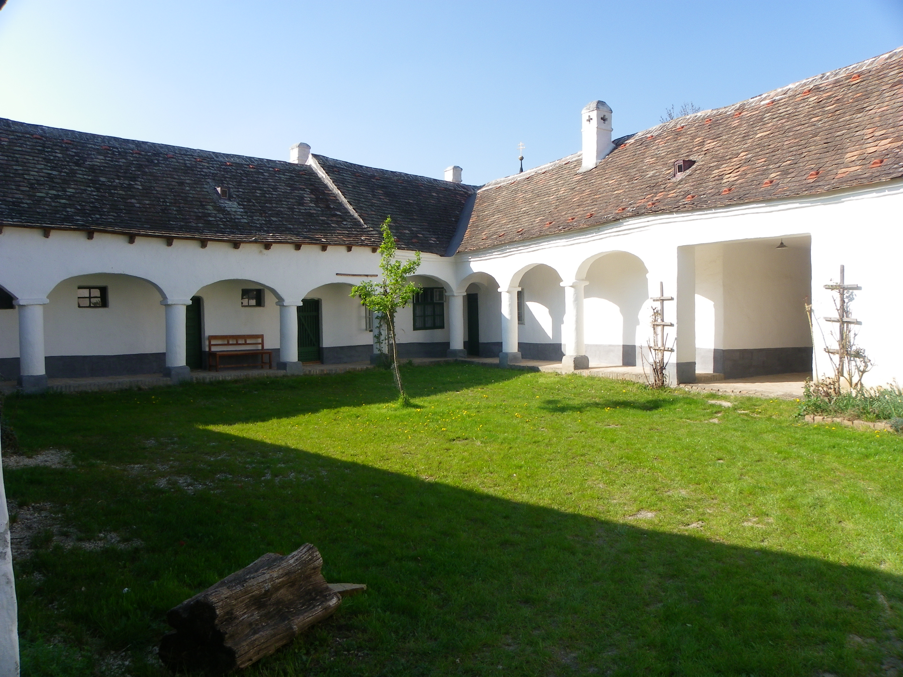 Wultendorfer Hof, Museumsdorf Niedersulz; 2011.04.23